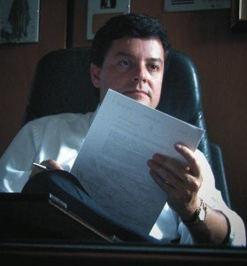 Federico Casaretto